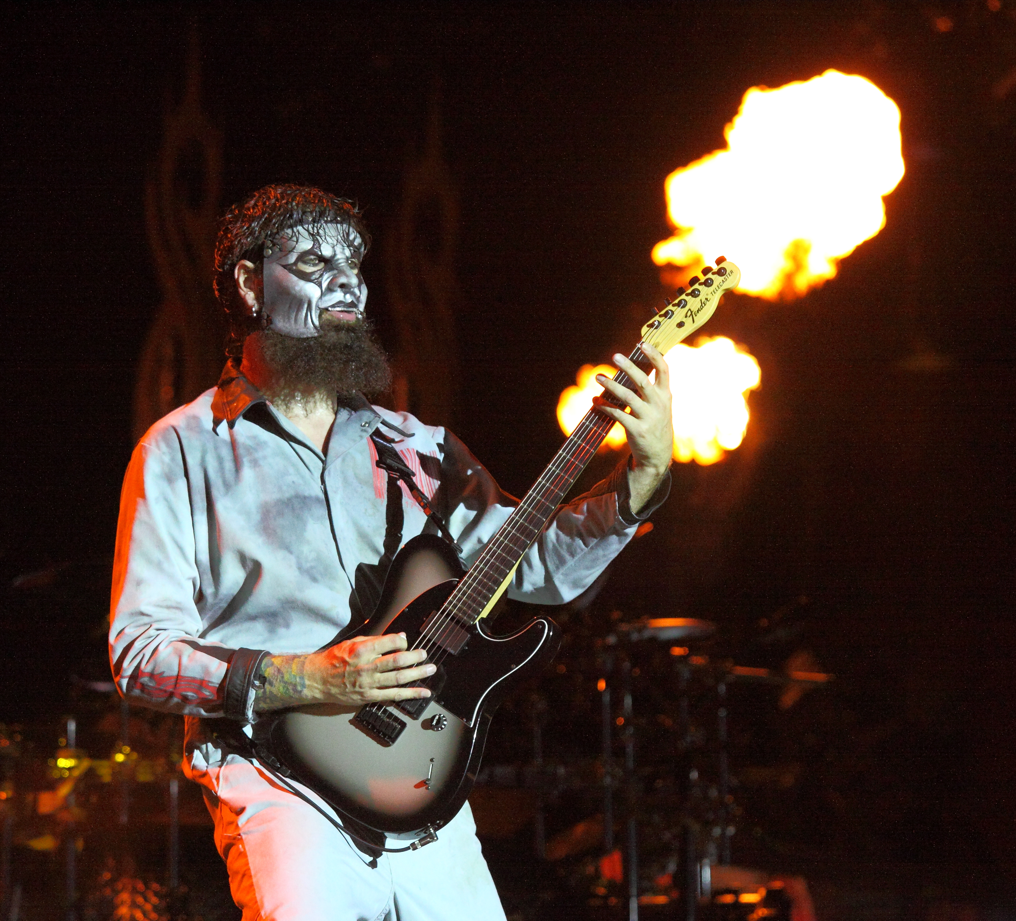 Slipknot live at Roskilde Festival 2013